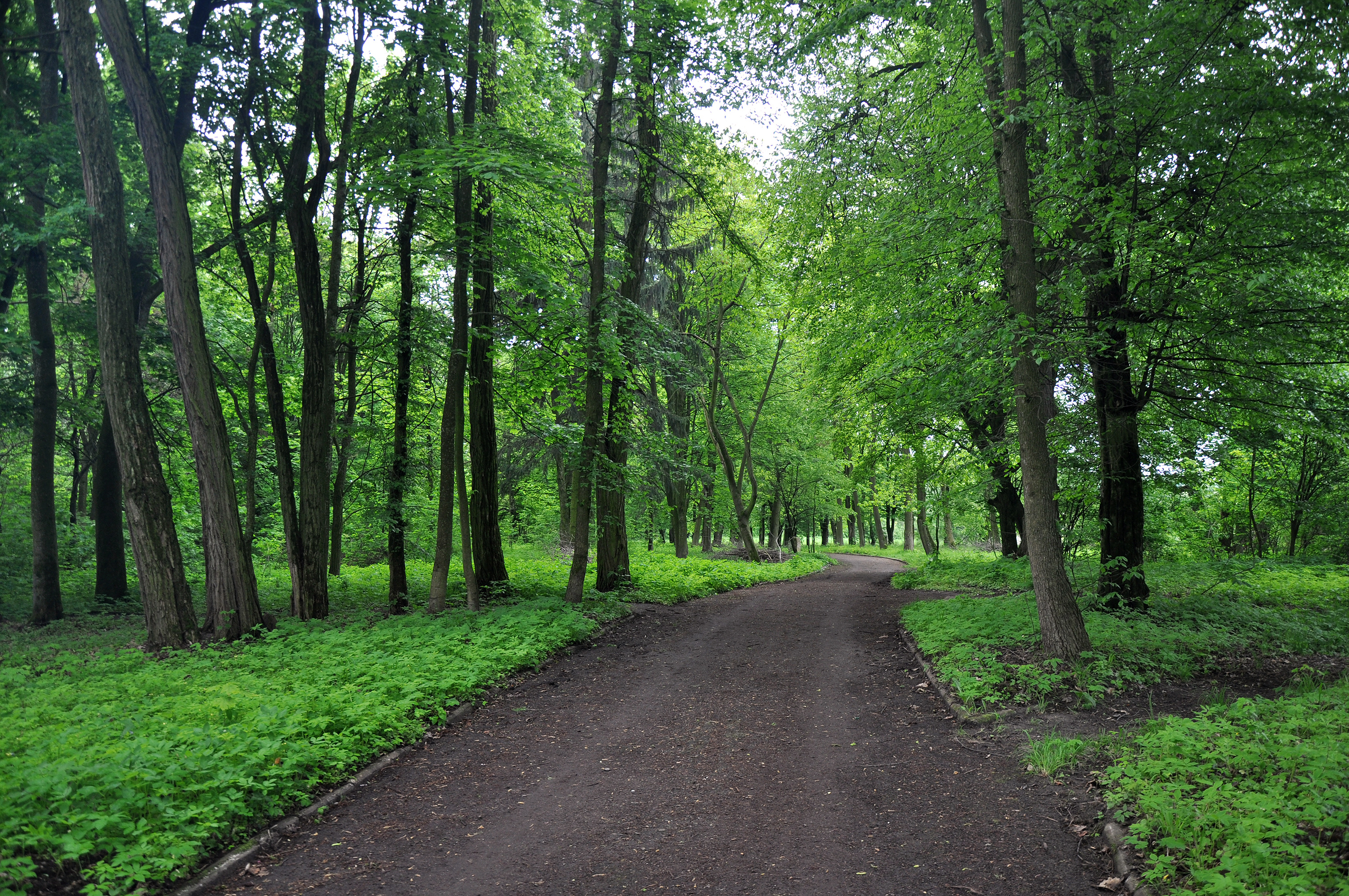 Парк санаторію «Роздол», Миколаївський р-н, смт Розділ